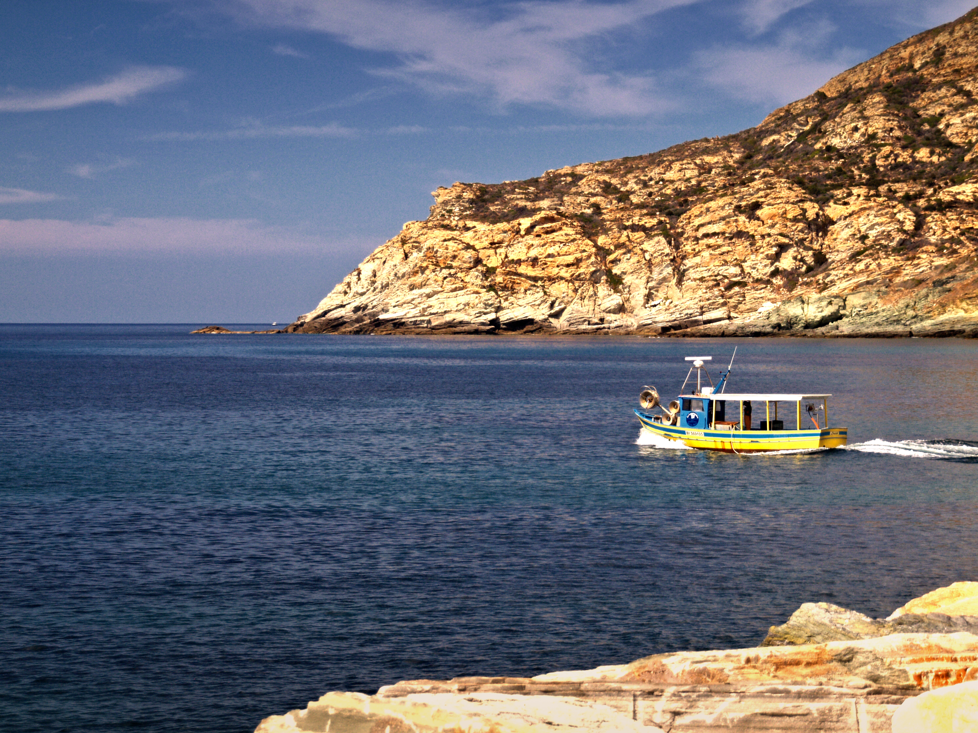 Centuri (Corsica) - Capu Biancu